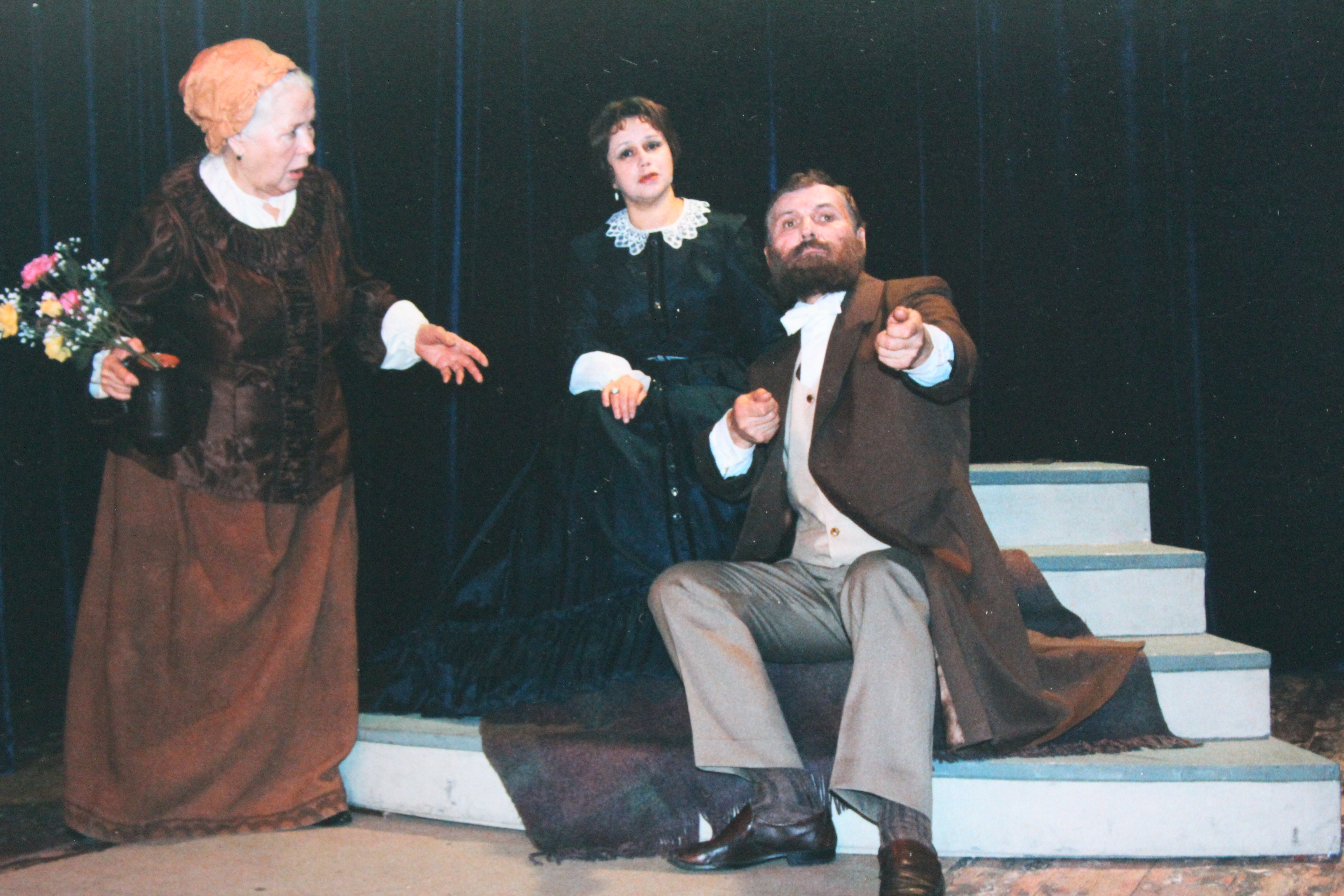 Сцена из спектакля «Дар Божий» Санкт-Петербургского драматического театра «Патриот» РОСТО. В роли Фёдора Михайловича Достоевского Геннадий Егоров, в роли Анны Сниткиной Татьяна кудрявцева, в роли Федосьи Нина Мазаева.